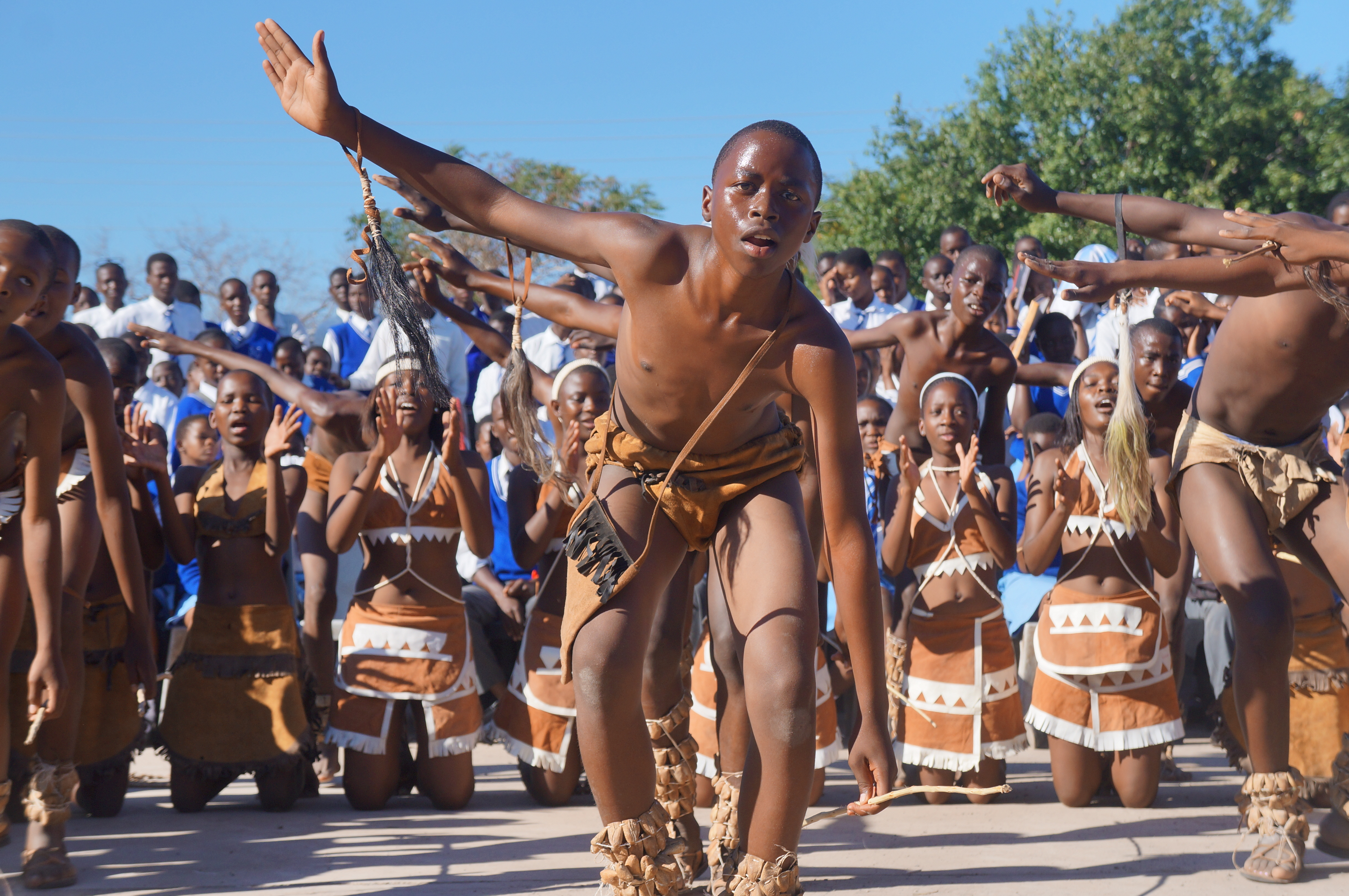 表演者再现了博茨瓦纳古老民族的生活，包括捕猎、生火、祭祀等场景 This is an image of "African people at work" from Botswana